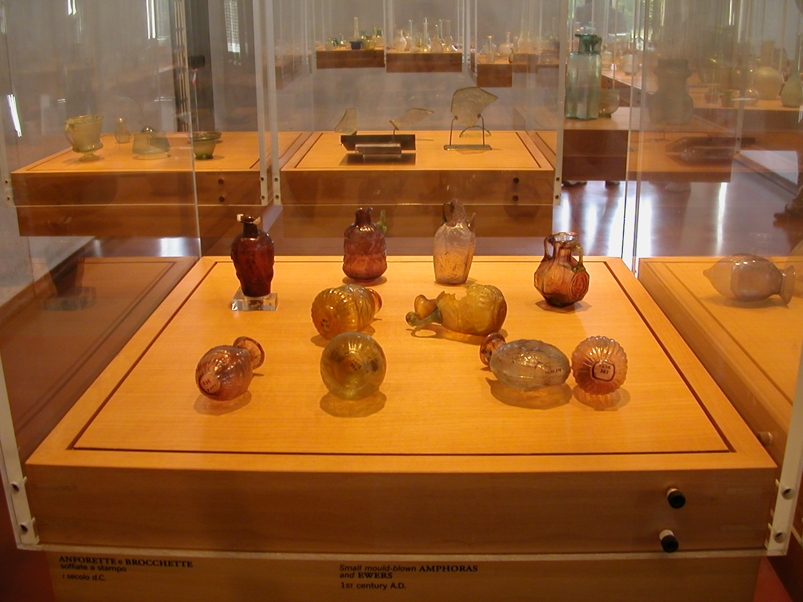 Reperti romani dalla Dalmazia, in vetro soffiato a stampo, nel Museo del vetro di Murano.